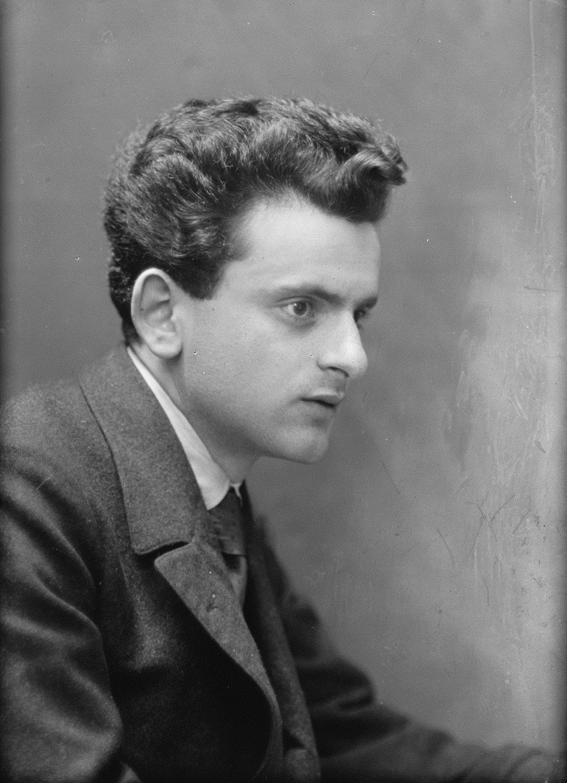 Abel J. Herzberg als jonge man, ca. 1913.